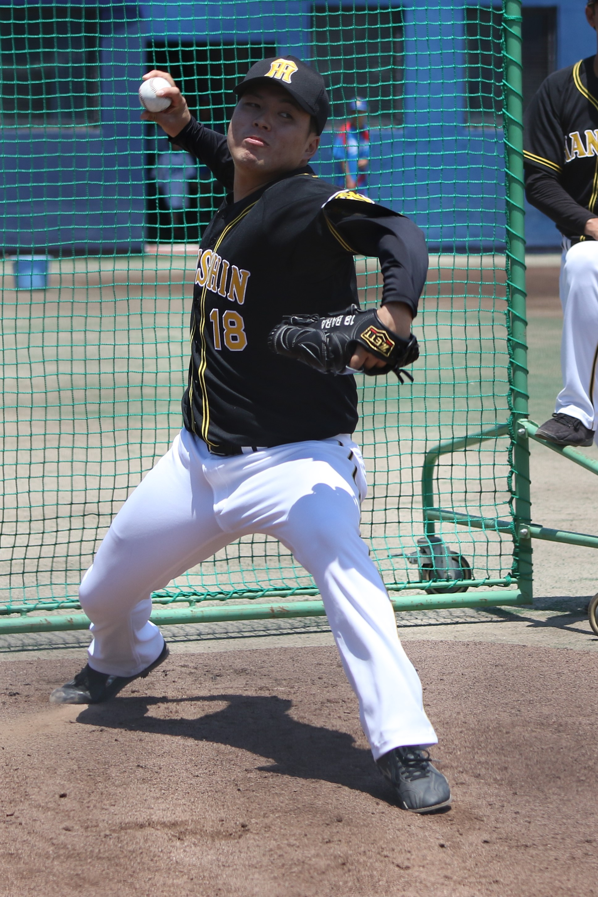 阪神タイガース時代 （2019年5月25日、ナゴヤ球場にて）